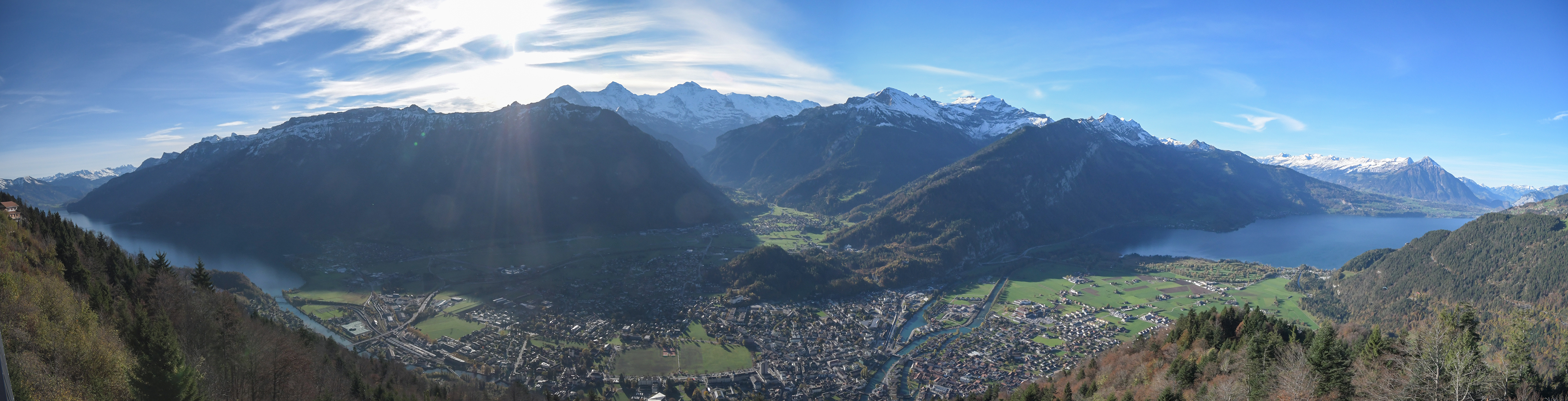 在哈德昆景觀臺所拍下的因特拉肯與周圍地景